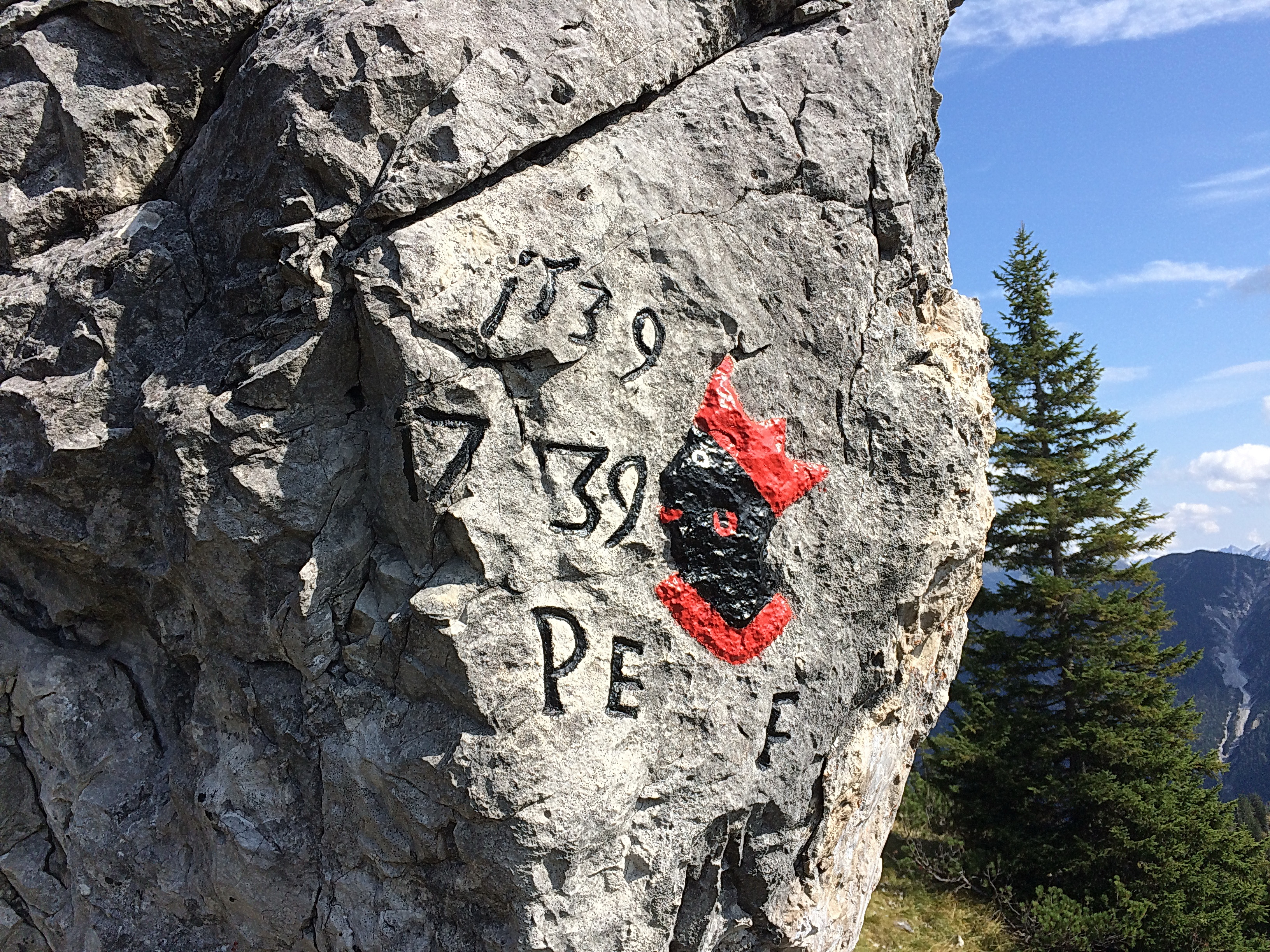 Felsmarch am Sockel des SW-Grates des Hohen Grasbergs mit Bild des Freisinger Mohren. Historische Grenze von 1539 zwischen dem Landgericht Tölz (li) und der Grafschaft Werdenfels des Hochstifts Freising (r)